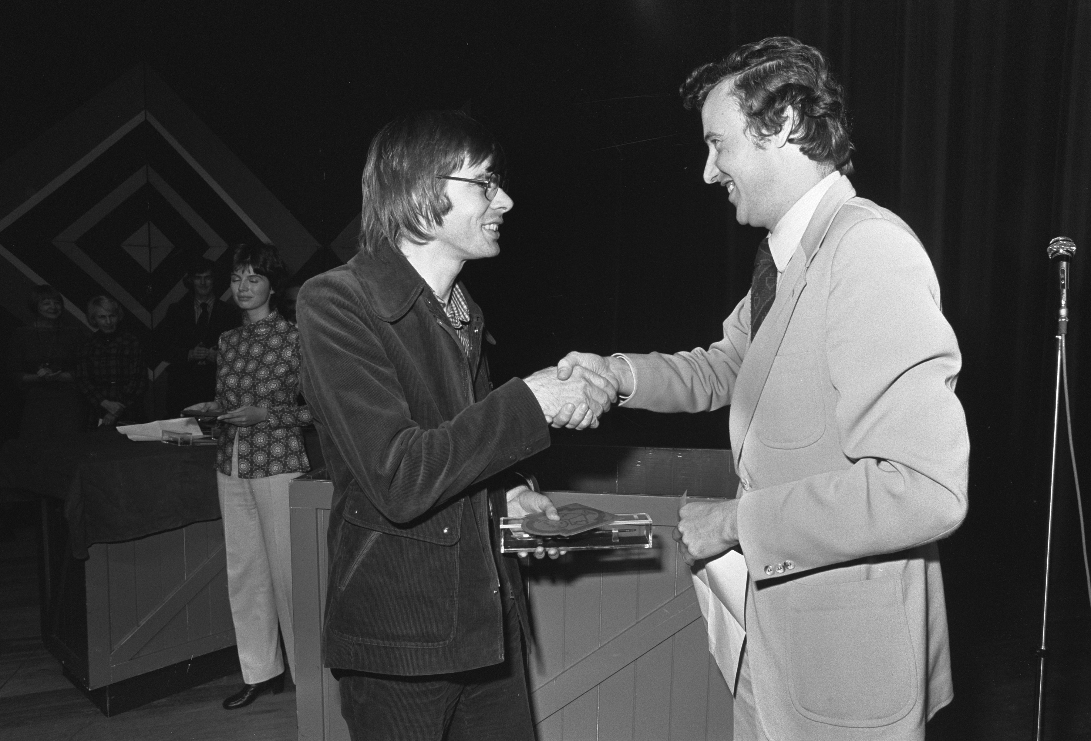 Collectie / Archief : Fotocollectie Anefo Reportage / Serie : [ onbekend ] Beschrijving : Kinderboekenweek geopend met bekroning van kinderboeken in Rotterdam; nr. 11 Thea Beckman (l) wordt gefeliciteerd, nr. 14 Wim Hofman Datum : 19 oktober 1974 Locatie : Rotterdam, Zuid-Holland Trefwoorden : openingen Fotograaf : Mieremet, Rob / Anefo Auteursrechthebbende : Nationaal Archief Materiaalsoort : Negatief (zwart/wit) Nummer archiefinventaris : bekijk toegang 2.24.01.05 Bestanddeelnummer : 927-5237